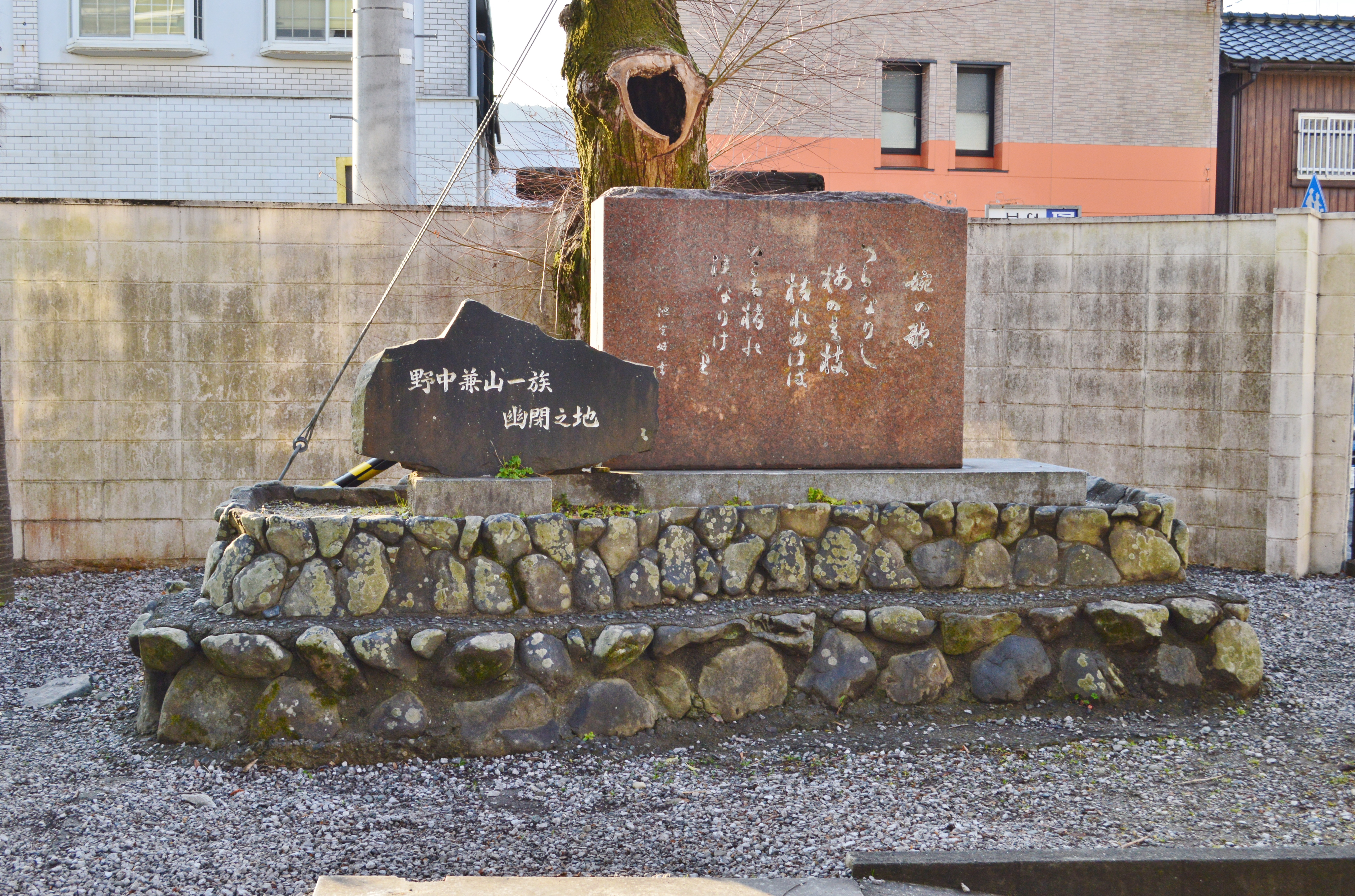 宿毛小学校内 野中兼山一族幽閉之地碑